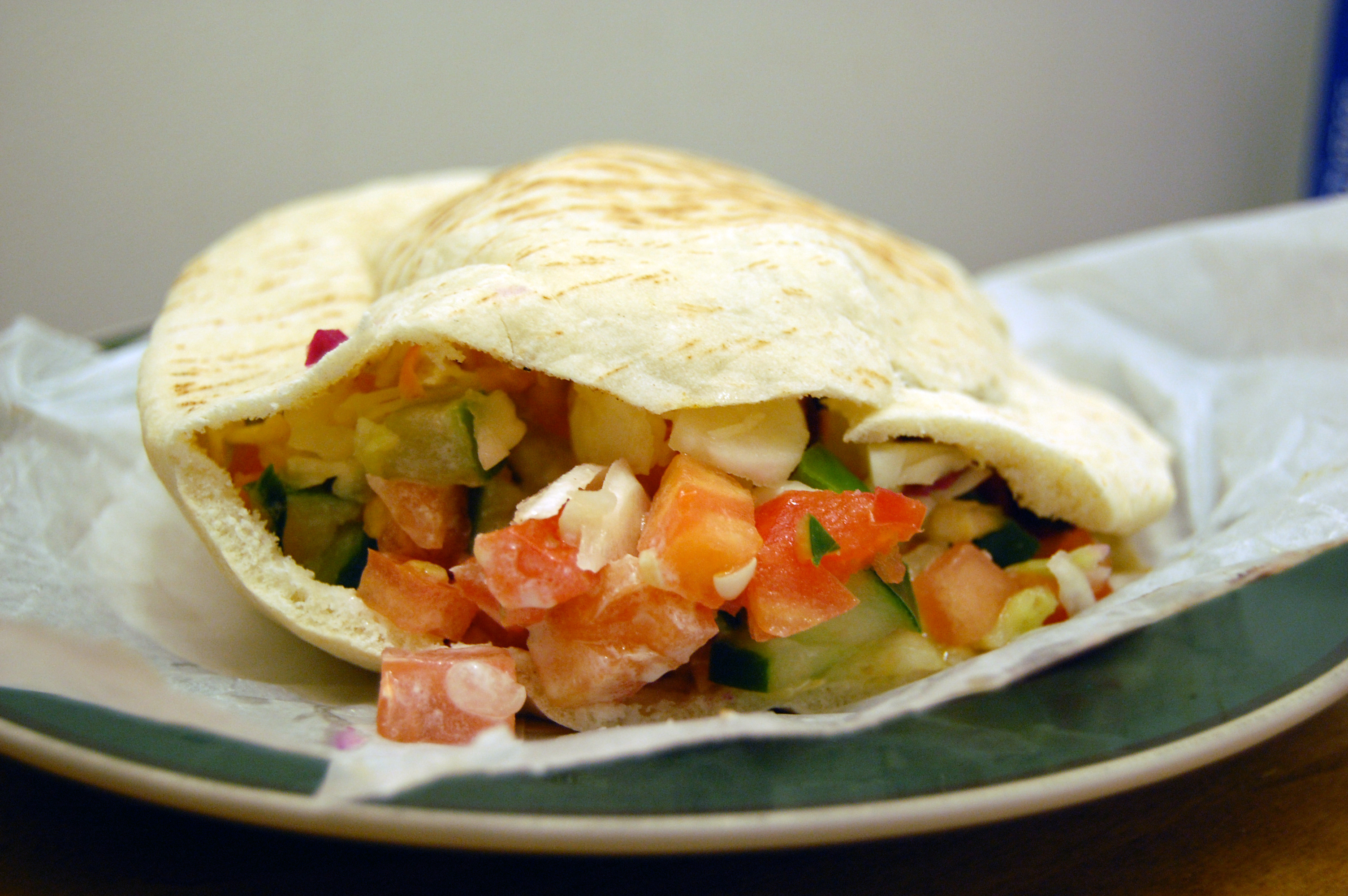 shawarma